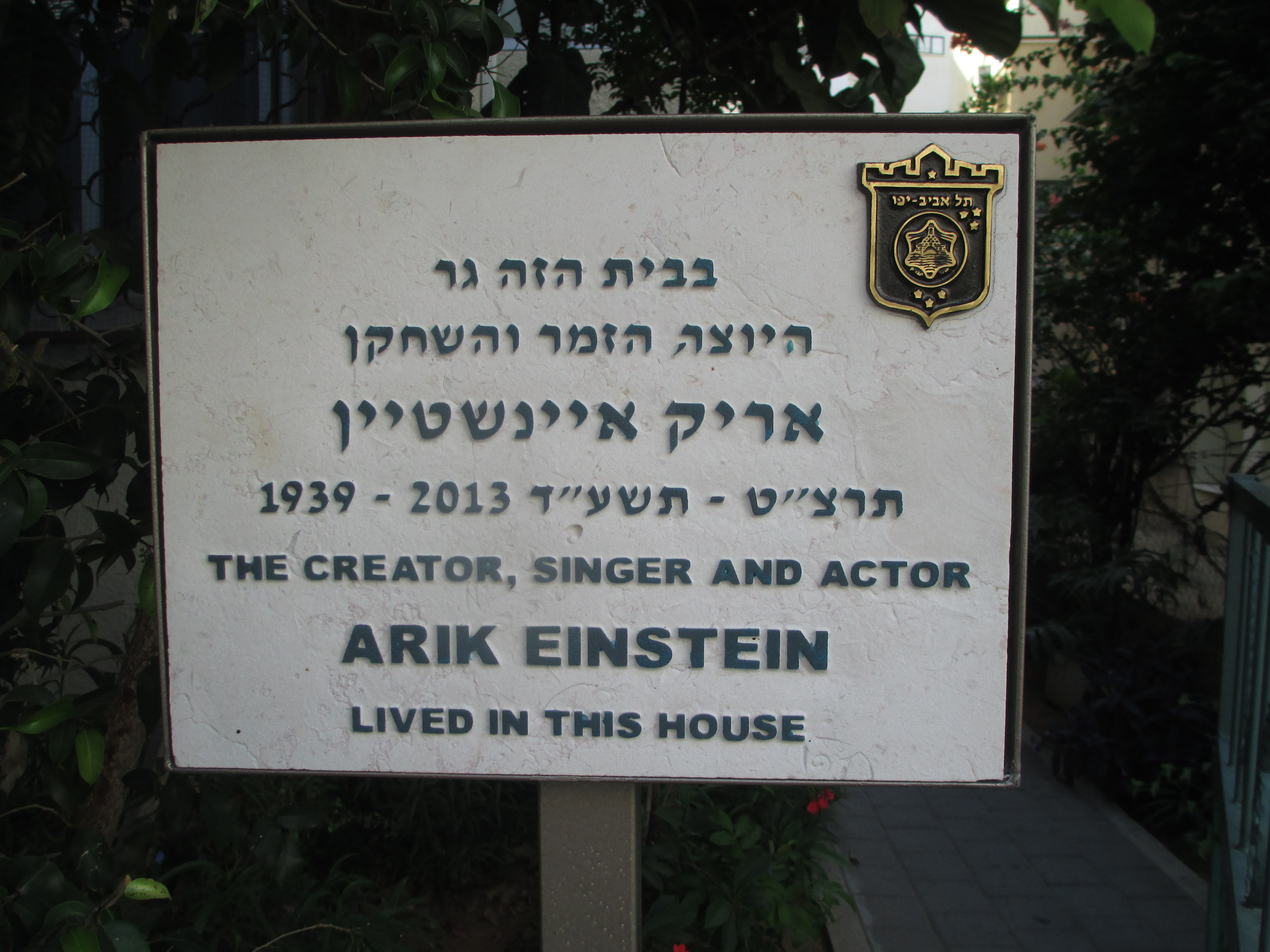 לוחית זיכרון בכניסה לביתו של אריק איינשטיין ברחוב חובבי ציון 40 בתל אביב